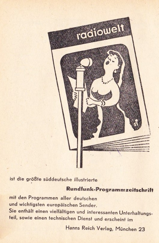 1947 Anzeige für die Radiowelt im Textbuch des "Fidelio"